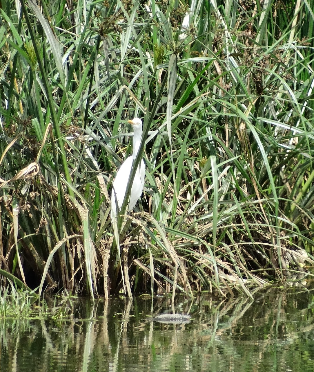 Lac Bogadi